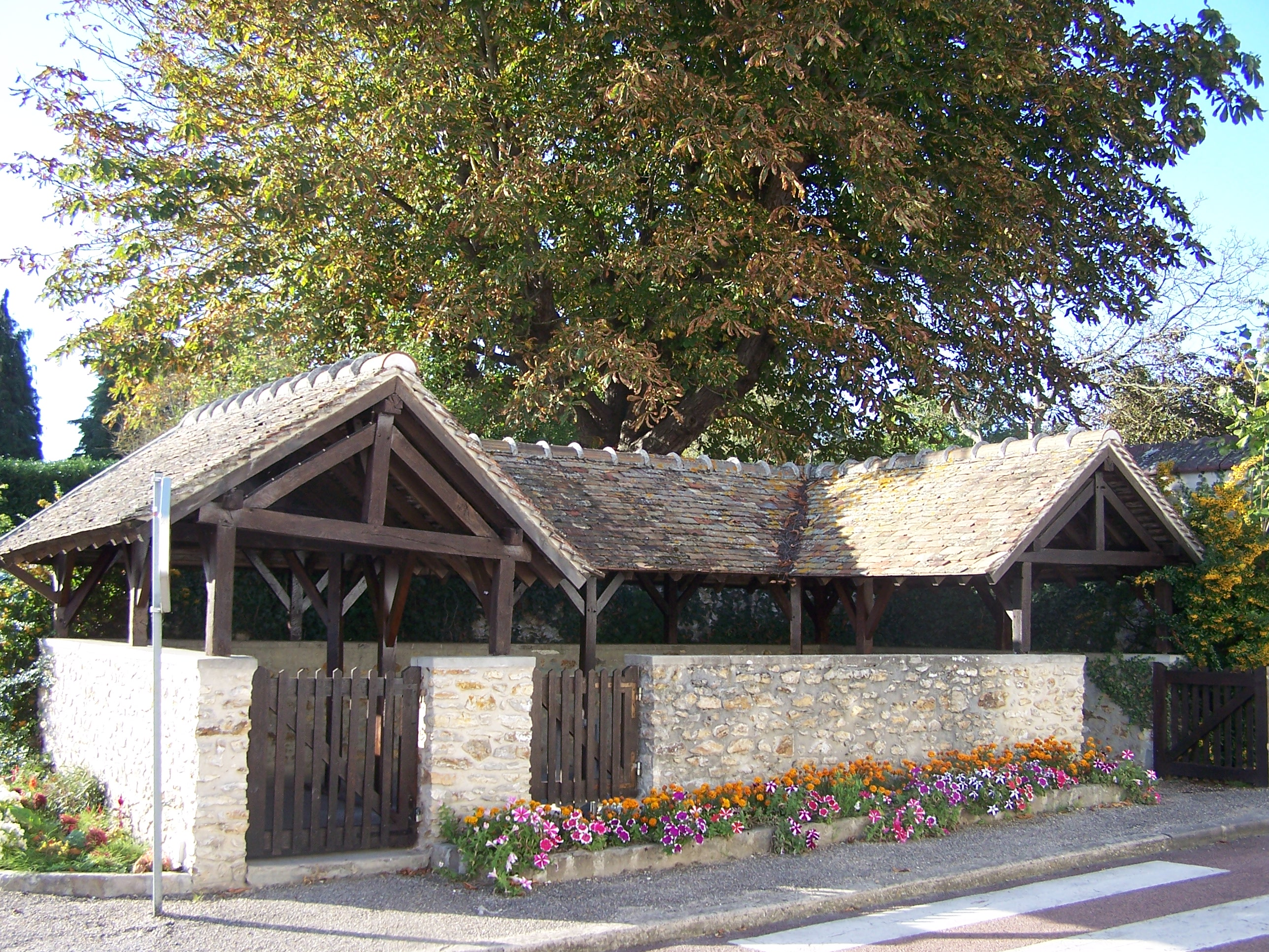 Lavoir d'Autouillet (Yvelines, France)